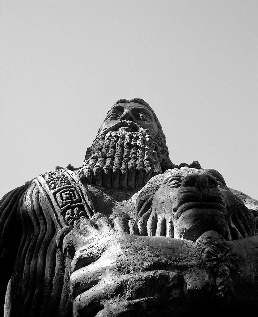 Taken at Sydney Uni.